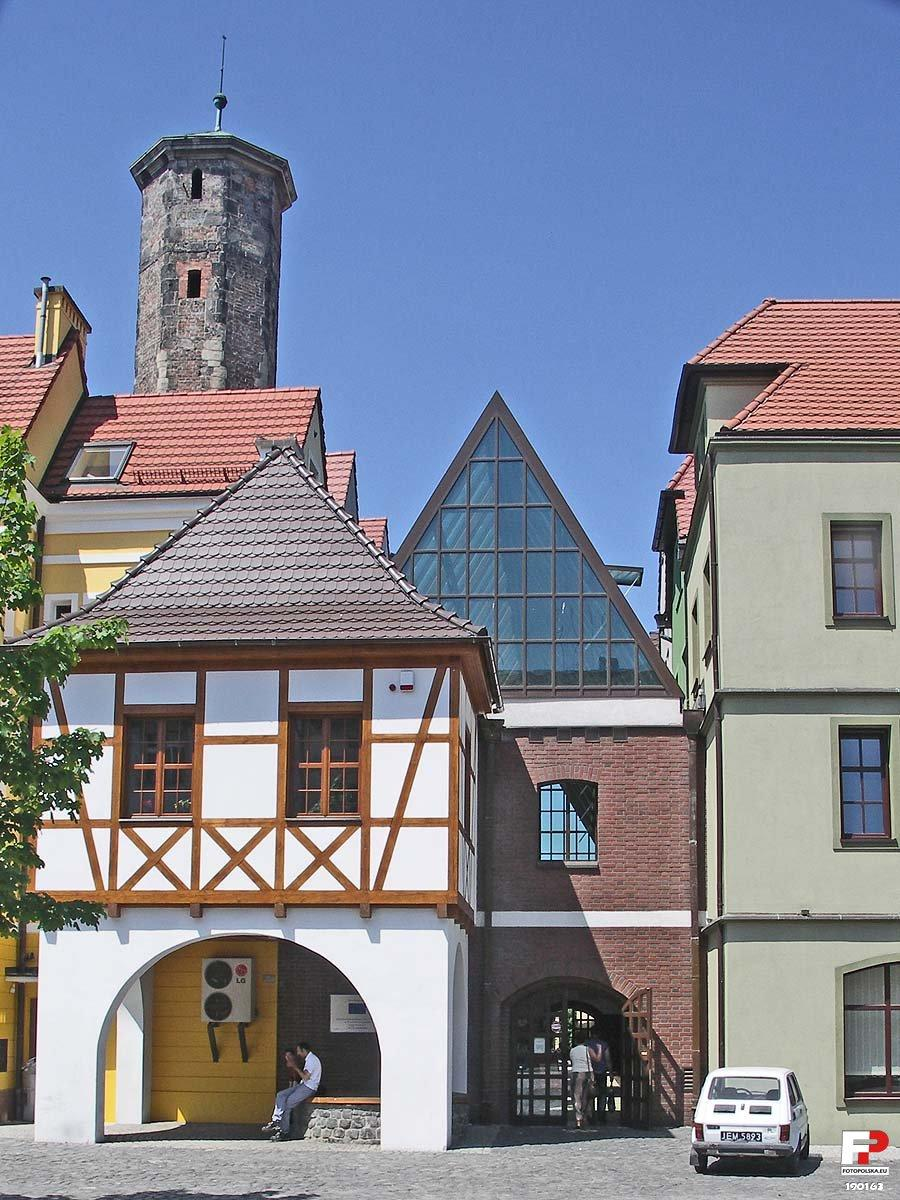 Widok na basztę i Tret od strony wschodniej